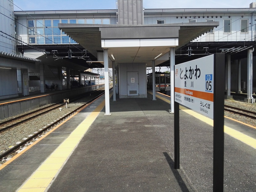 Toyokawa station platform